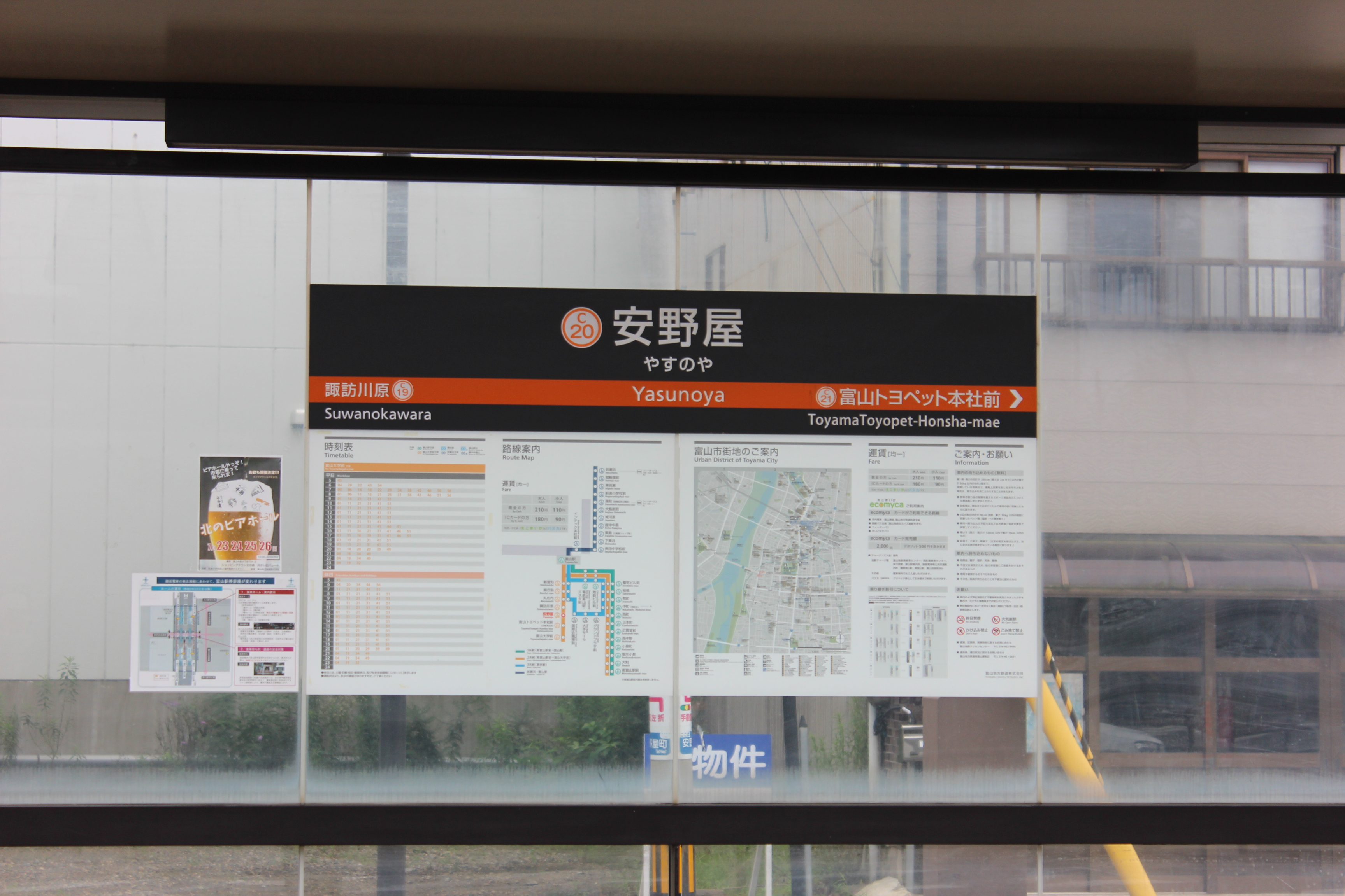 安野屋停留場の駅名標